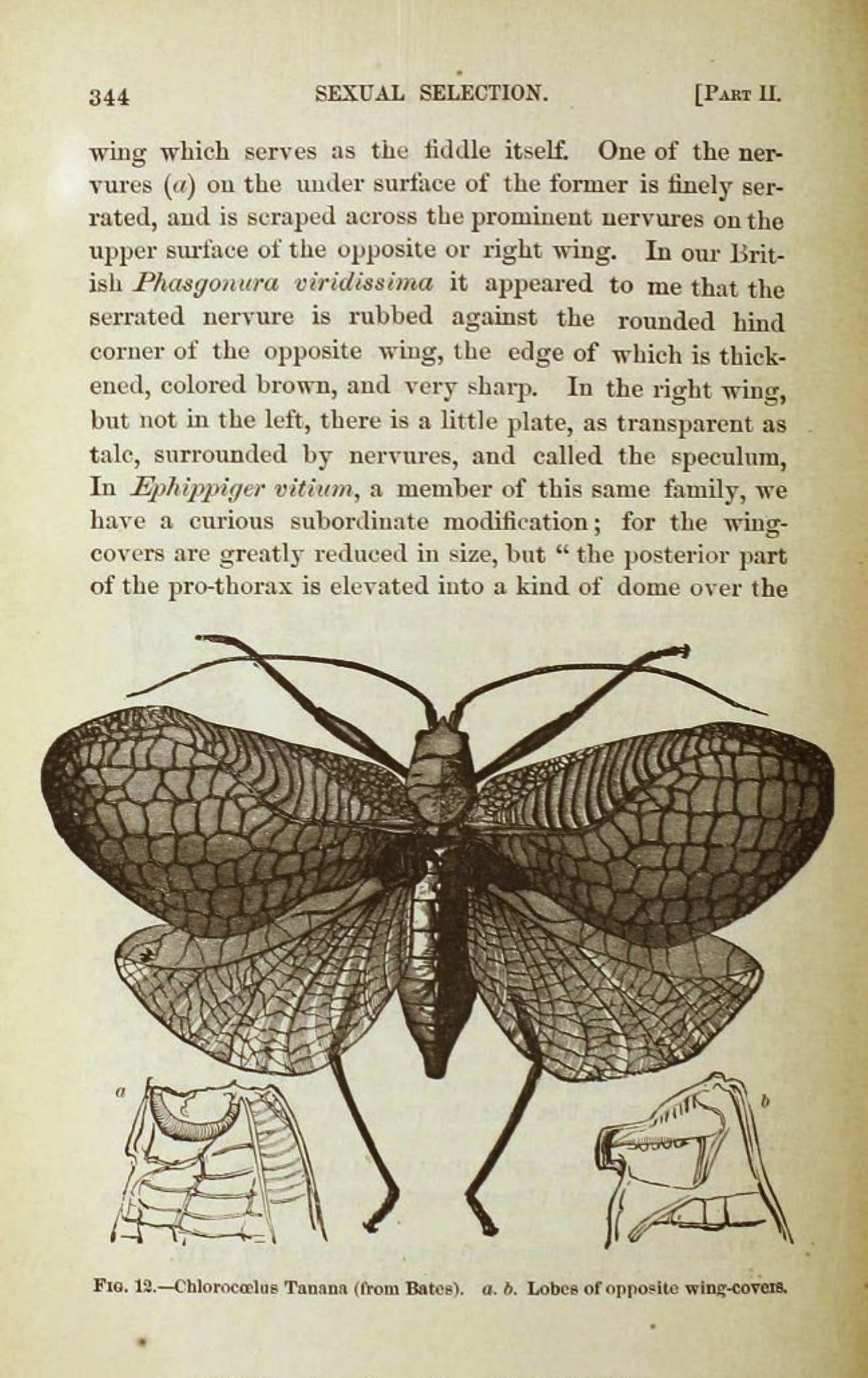 Thliboscelus hypericifolius, ilustrado por Henry W. Bates e reproduzido por Charles Darwin em Descent of Man (1871).